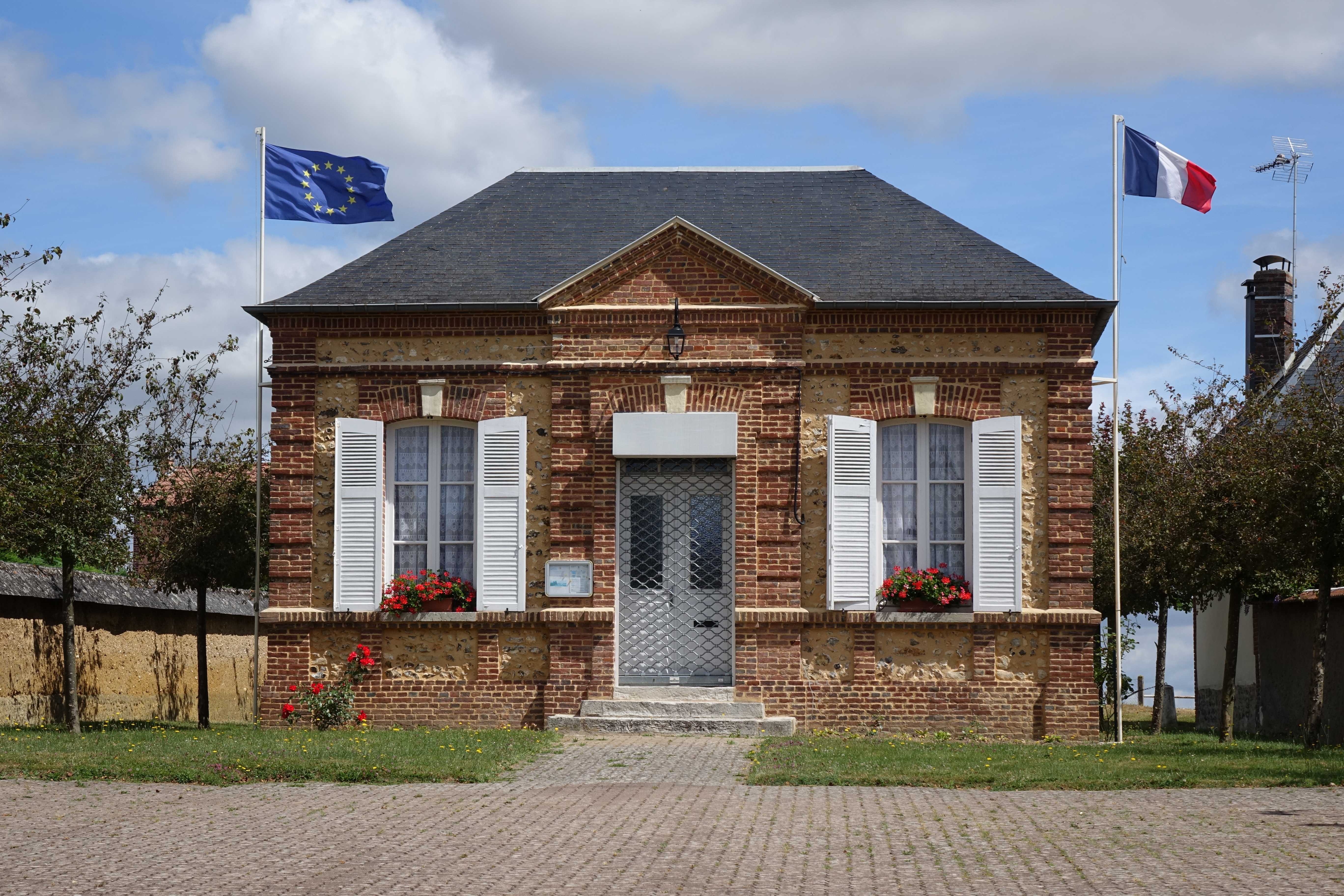 Mairie de Parville, Eure, France